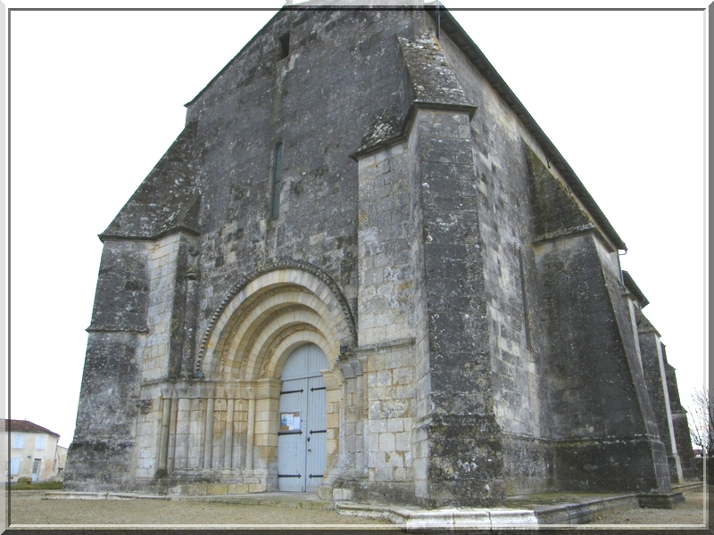 Eglisechermignac2